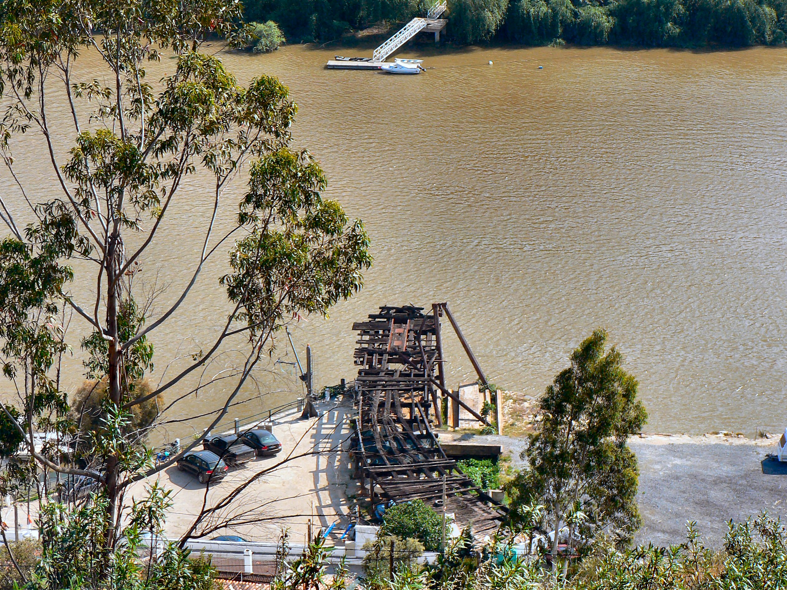 Vista do Rio Guadiana no Pomarão e antigo porto mineiro